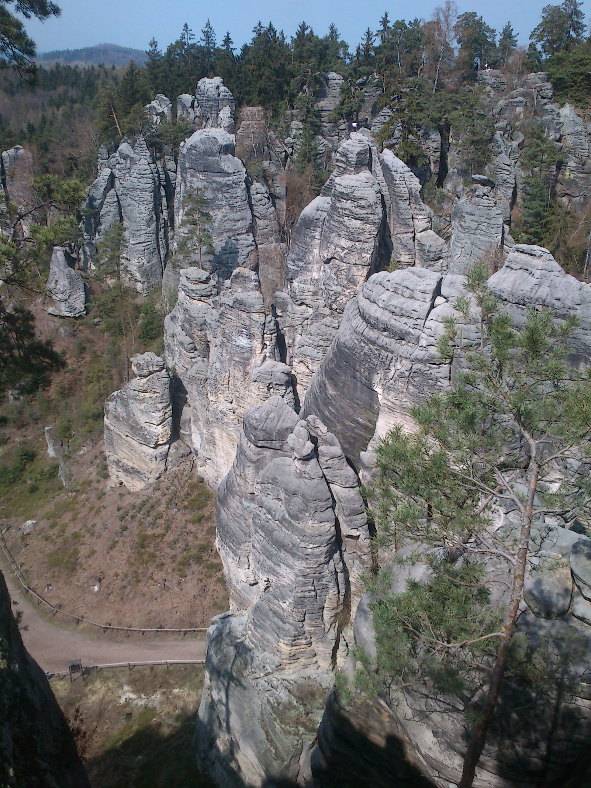 506 01 Samšina, Czech Republic